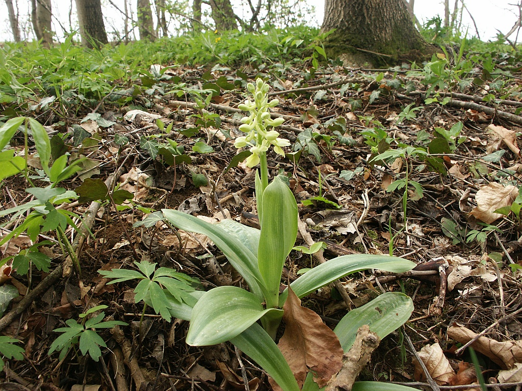 Orchis pallens - Habitat - eastern "Schwäbische Alb, Germany